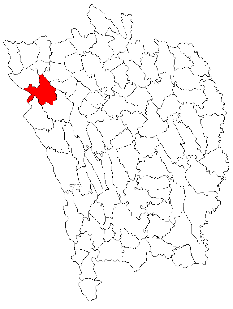 Categorie:Hărţi ale judeţului Vaslui